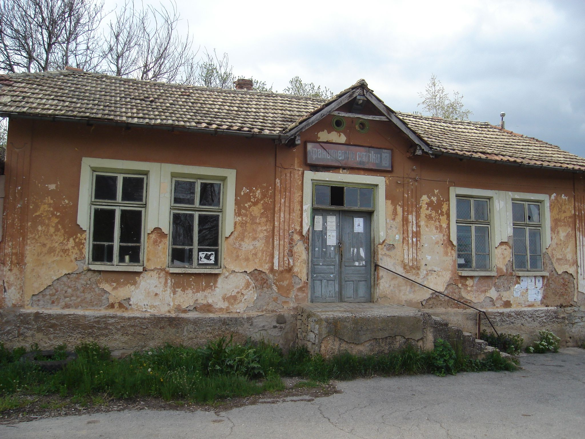 Село Чепърлянци - сградата на бившето начално училище, по-късно магазин. Днес сградата не се използва.